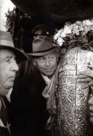 Israeli detective avid Tidhar, with the Abbo Torrah, 1950. הבלש העברי דוד תדהר בטקס ל"ג בעומר אוחז בספר התורה העתיק של משפחת עבו, 1950. משמאל - רפאל עבו